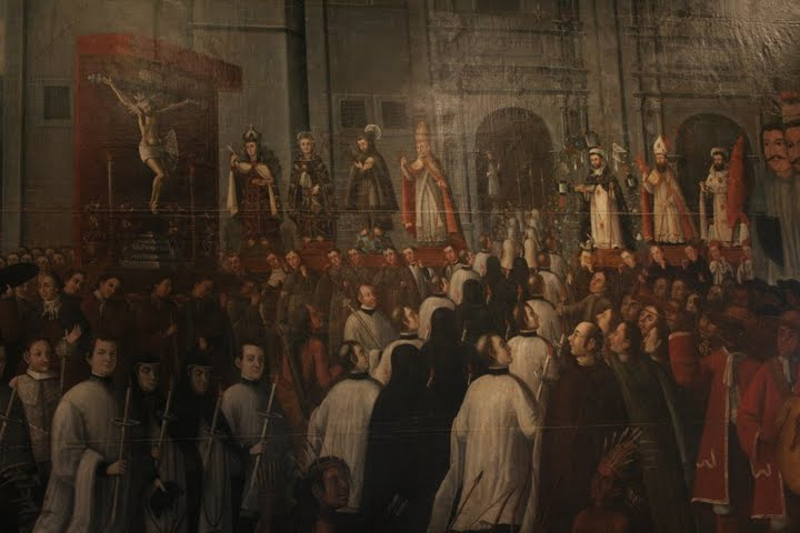 Detalle del cuadro "Traslado de las Monjas" del siglo XVIII